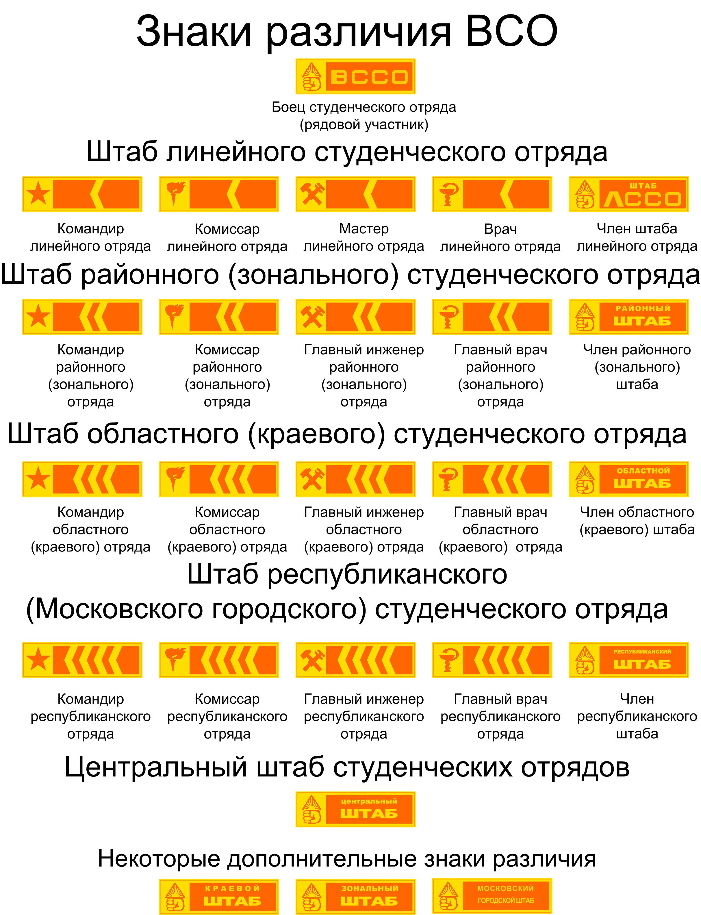 Знаки различия Всесоюзного студенческого отряда